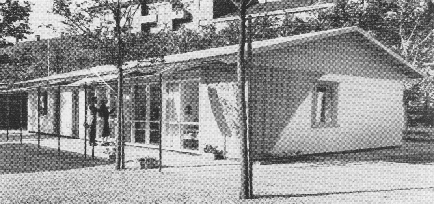 Enfamiljshuset "Skal och kärna", huset